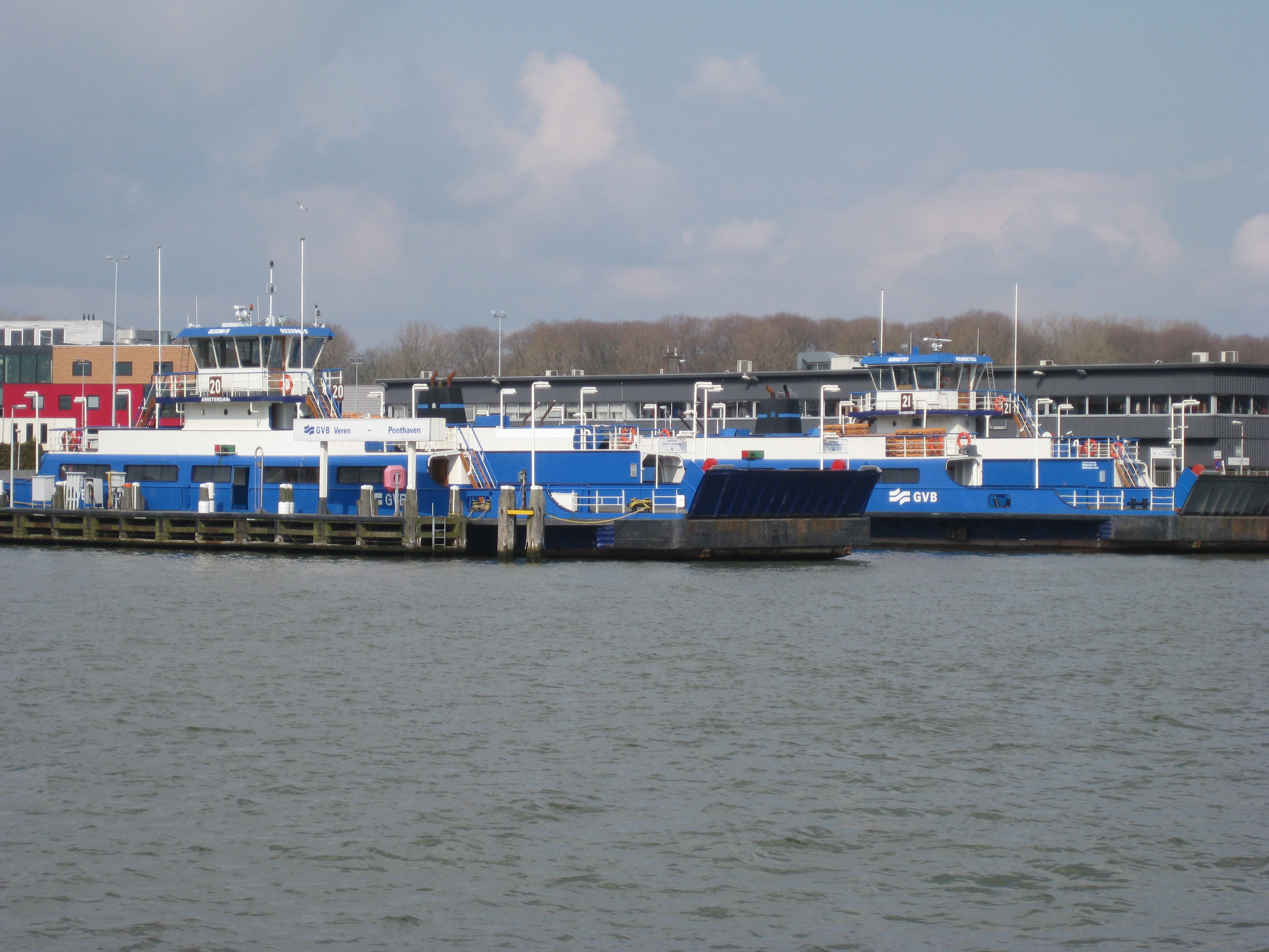 Ponthaven in het IJ, Amsterdam